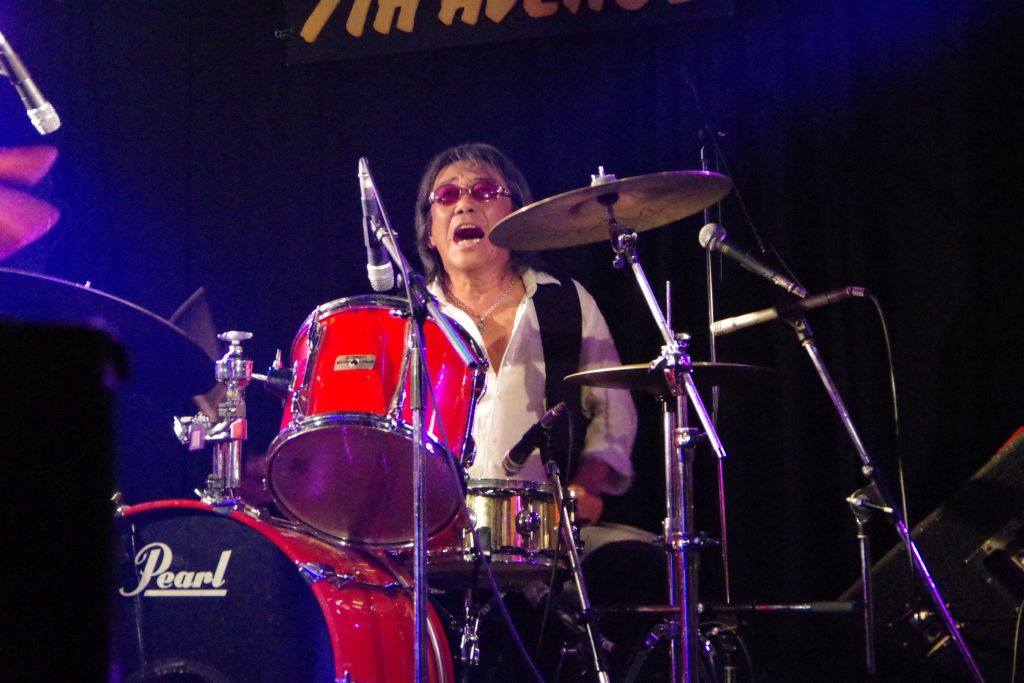 Jun Harada